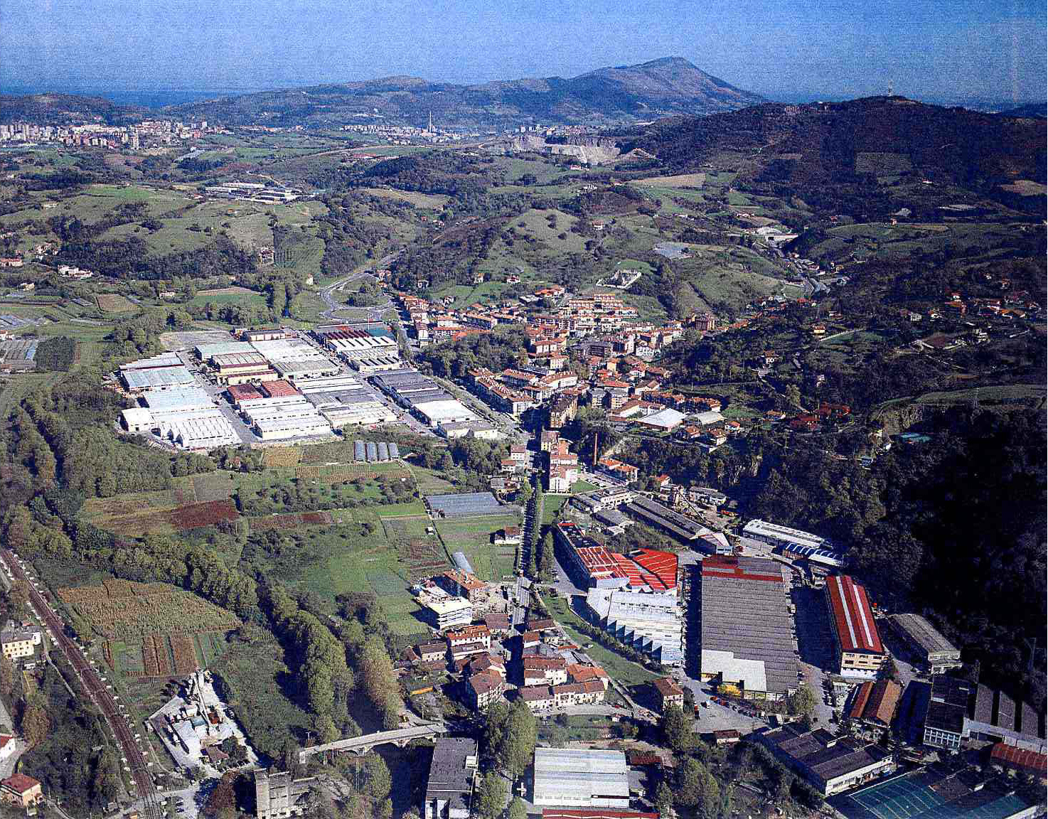 Astigarra eta Jaizkibelen ikuspegia.